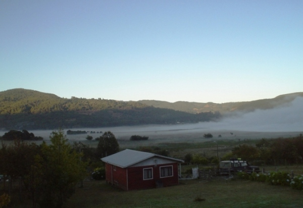 Niebla matinal en lago Lanalhue, Contulmo, Chile